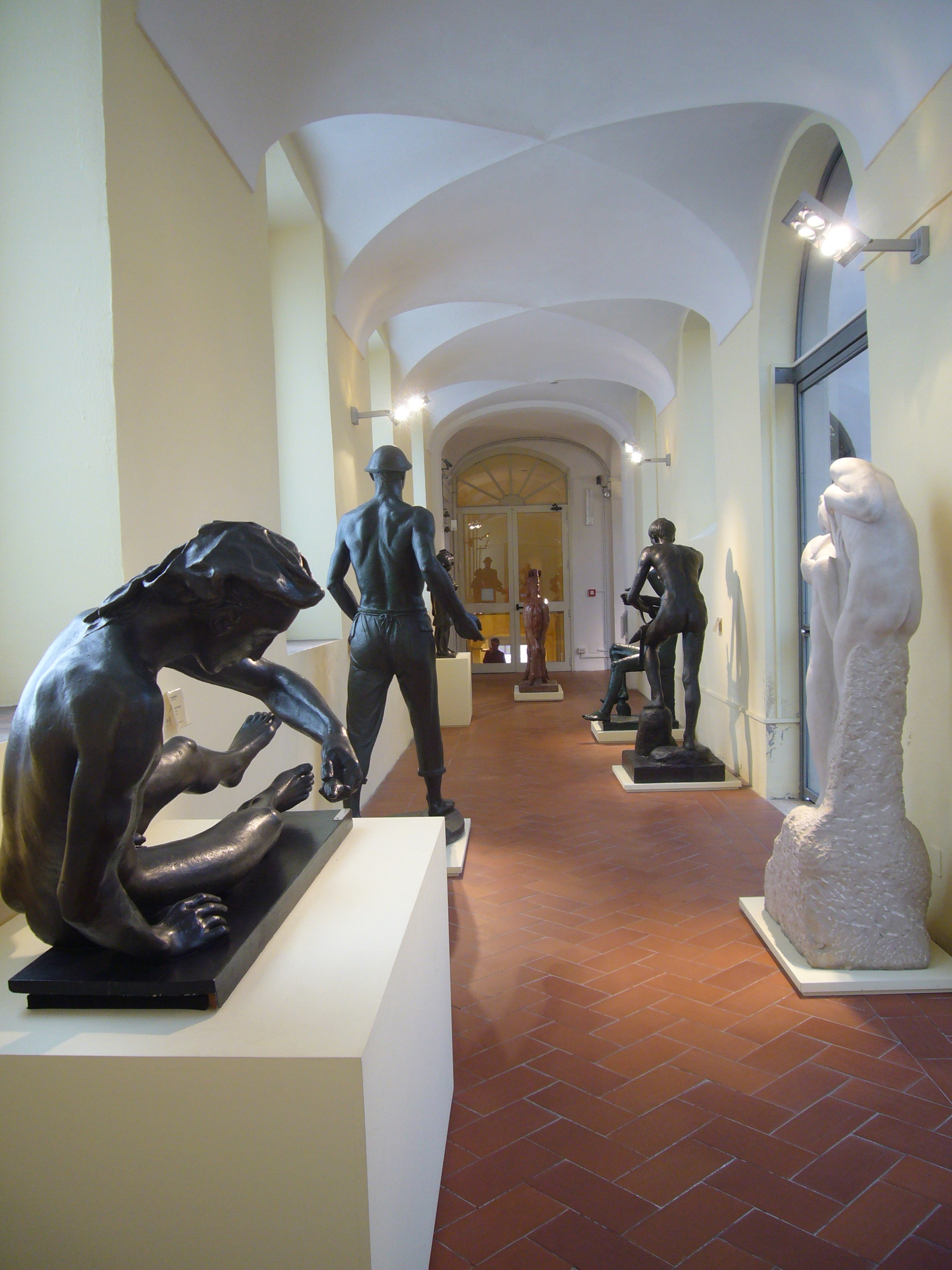 Roma, Galleria comunale di Arte moderna - galleria delle sculture